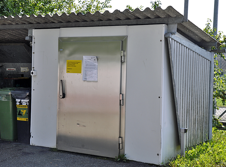 Tierkadaversammelstelle in Uerikon ZH, Schweiz